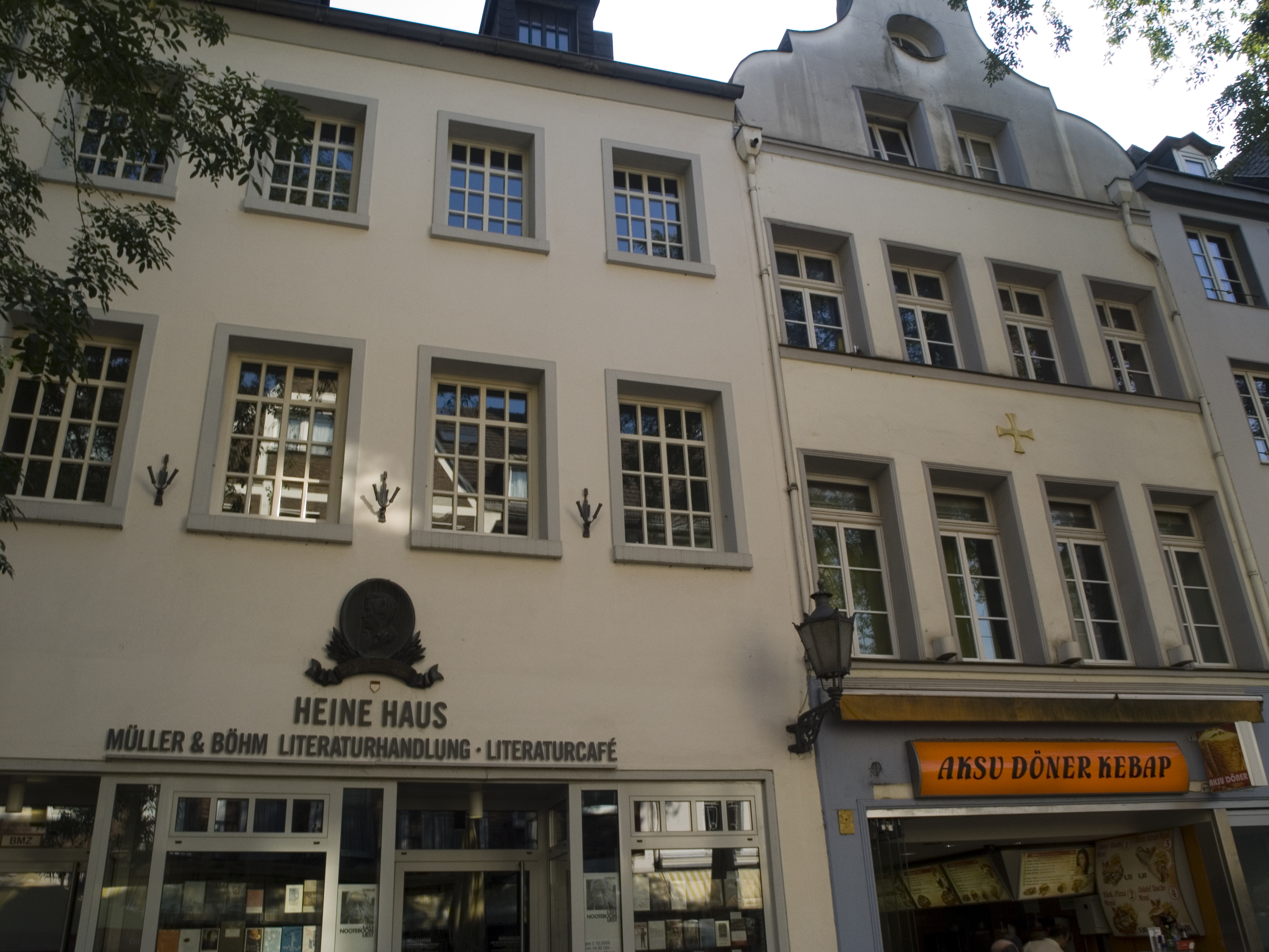 Северный Рейн - Вестфалия, Дюссельдорф - Болькерштрассе